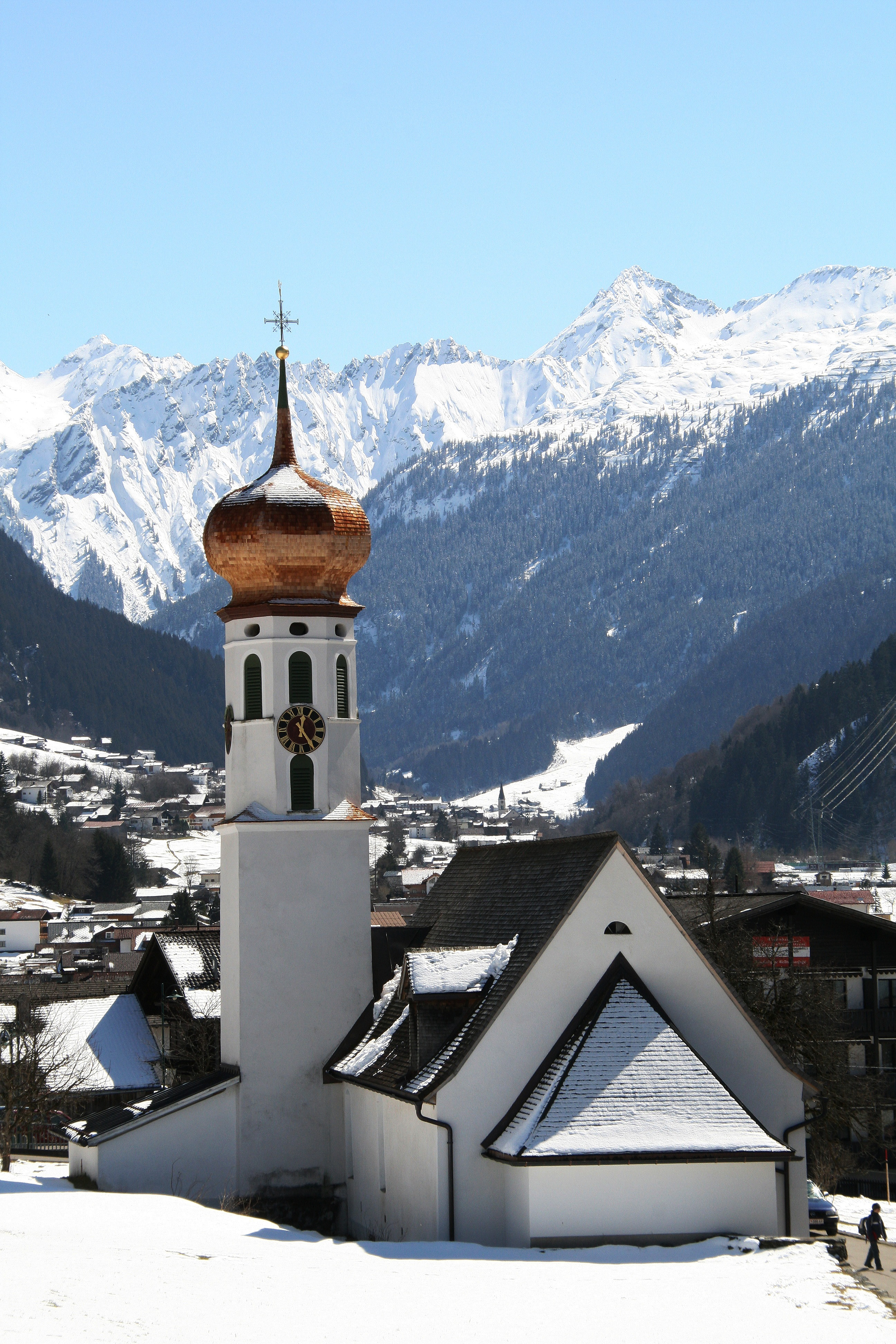 Kuratienkirche hl. Nikolaus, in Gortipohl (einem Ortsteil von Sankt Gallenkirch im Montafon, Vorarlberg.